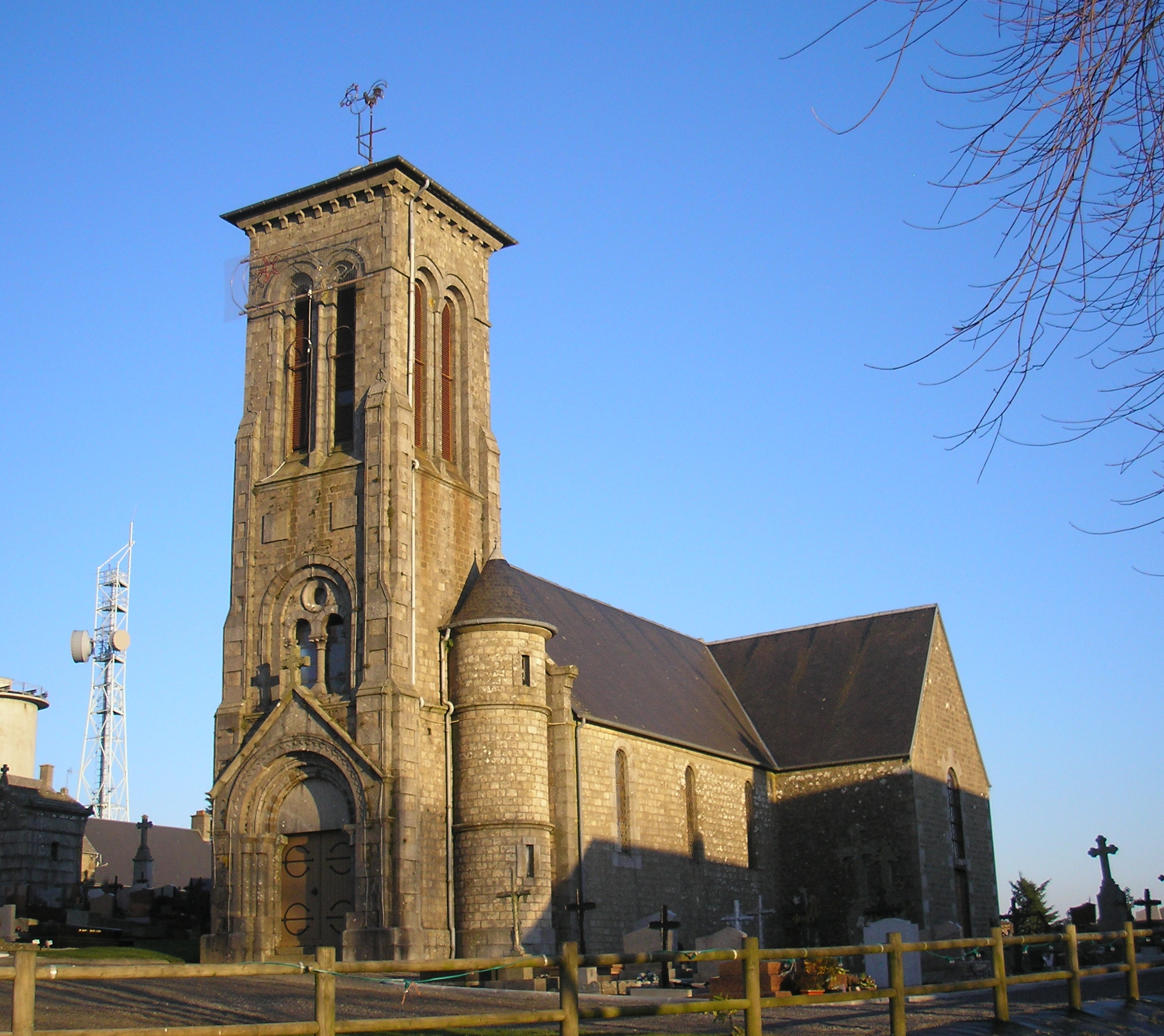 Chaulieu (Normandie, France). L'église de Saint-Martin-de-Chaulieu.